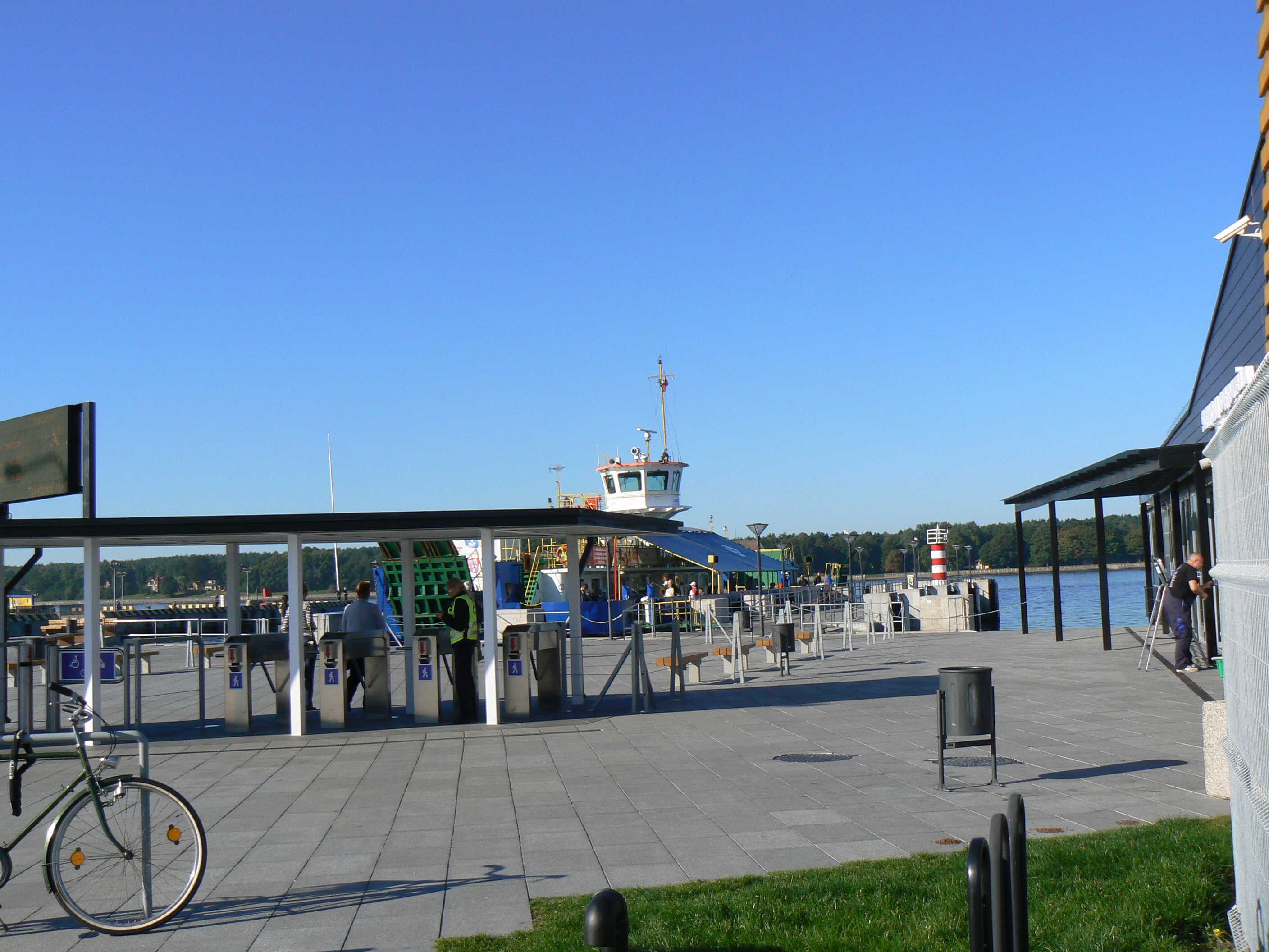 Starý přívoz (Senoji perkėla) v Klaipėdě na pravém břehu Danė při jejím ústí do Kuršského zálivu. Pohled směrem k západu